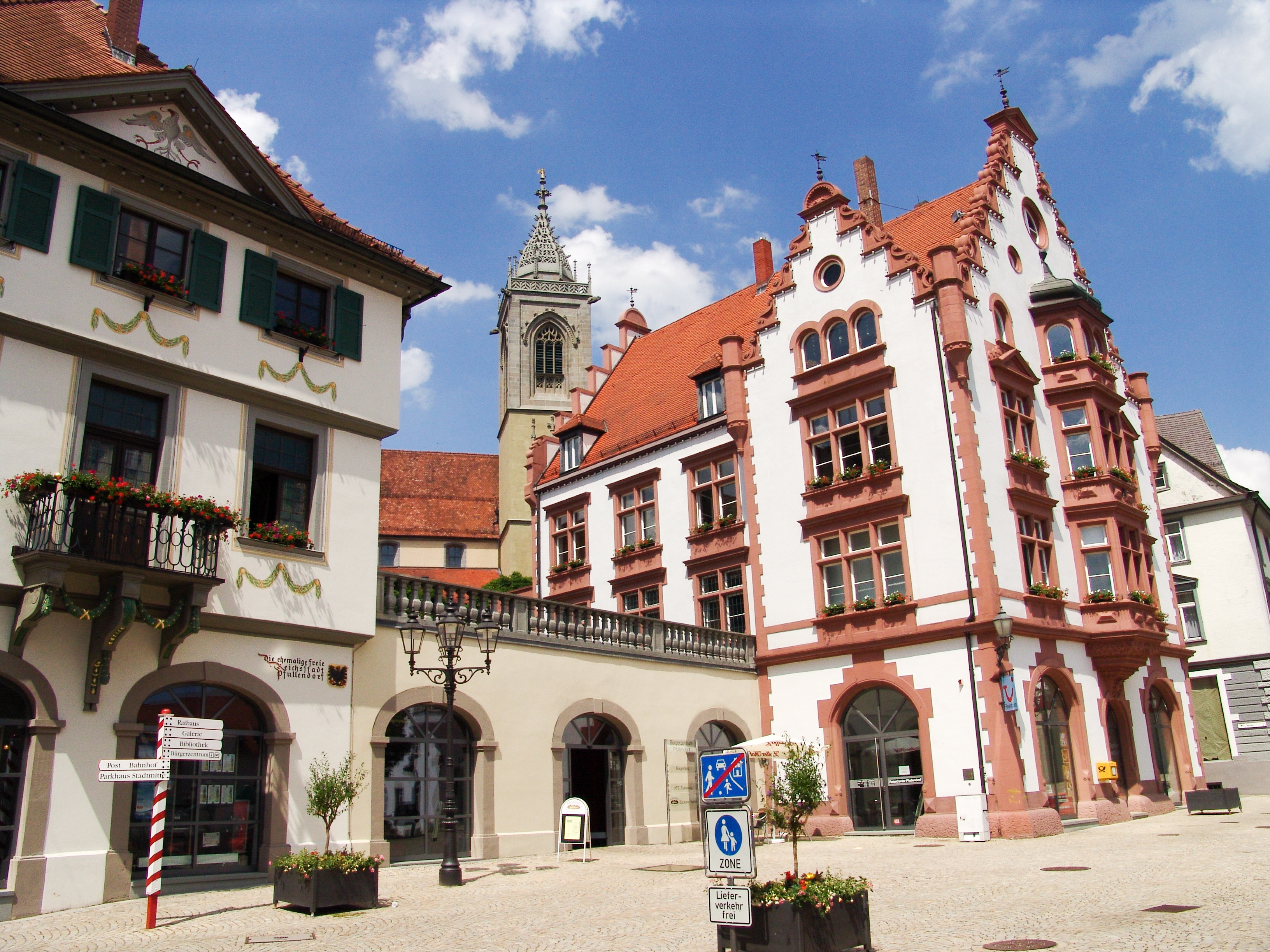 Pfullendorf